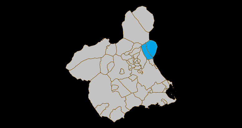 aaaaa